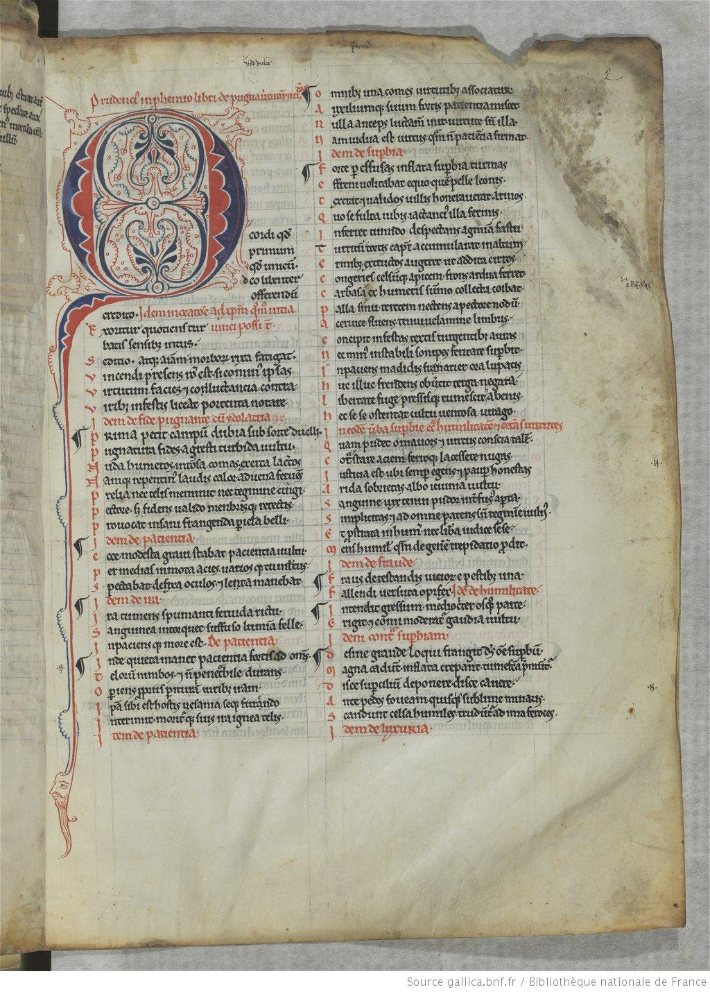 Titre : Florilegium Gallicum. Date d'édition : 1200-1225 Type : manuscrit Langue : Latin Format : Parchemin. - 170 ff. - Grandes et moyennes initiales puzzle bleues et rouges filigranées de bleu et de rouge, nombreuses initiales alternativement rouges filigranées de bleu et bleues filigranées de rouge, petites initiales alternativement bleues et rouges. - 340 × 250 mm. - Demi-reliure parchemin naturel. Anciennes gardes de parchemin contenant des fragments d'actes et des extraits des registres du Parlement de Paris (XVe et XVIe s.) reliées avec le ms. (ff. 168-170) Droits : domaine public Identifiant : ark:/12148/btv1b52500967c Source : Bibliothèque nationale de France, Département des manuscrits, Latin 17903